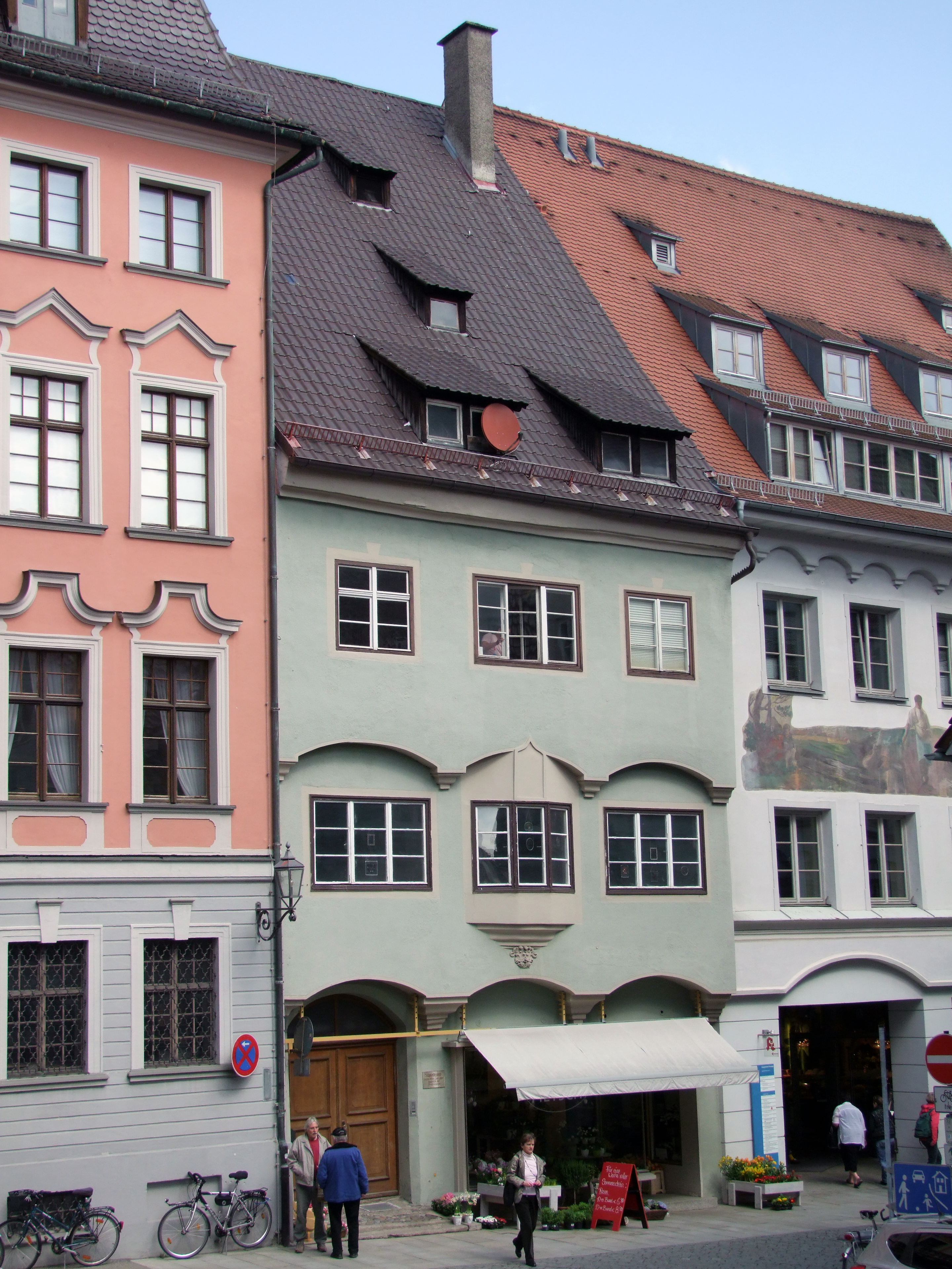 Schmiedezunft in der Zangmeisterstraße am Marktplatz im oberschwäbischen Memmingen.